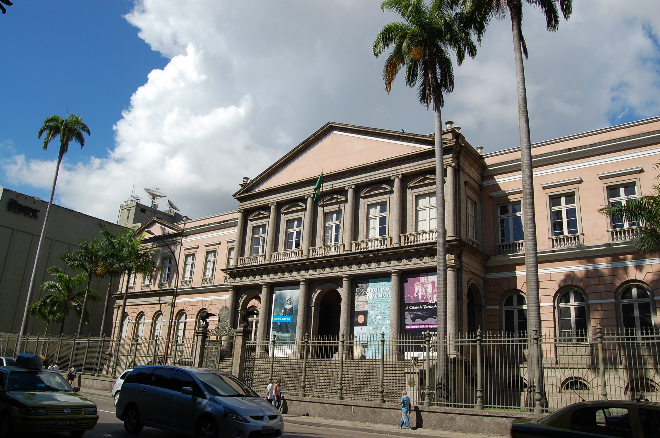 Exterior do Arquivo Nacional, Rio de Janeiro, Brasil.